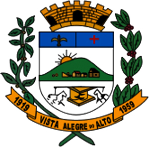 Brasão do município de Vista Alegre do Alto